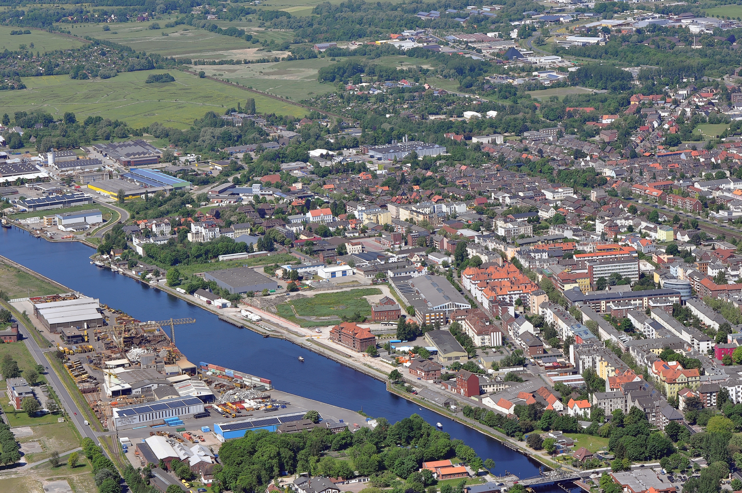 Luftbilder von der Nordseeküste 2012-05